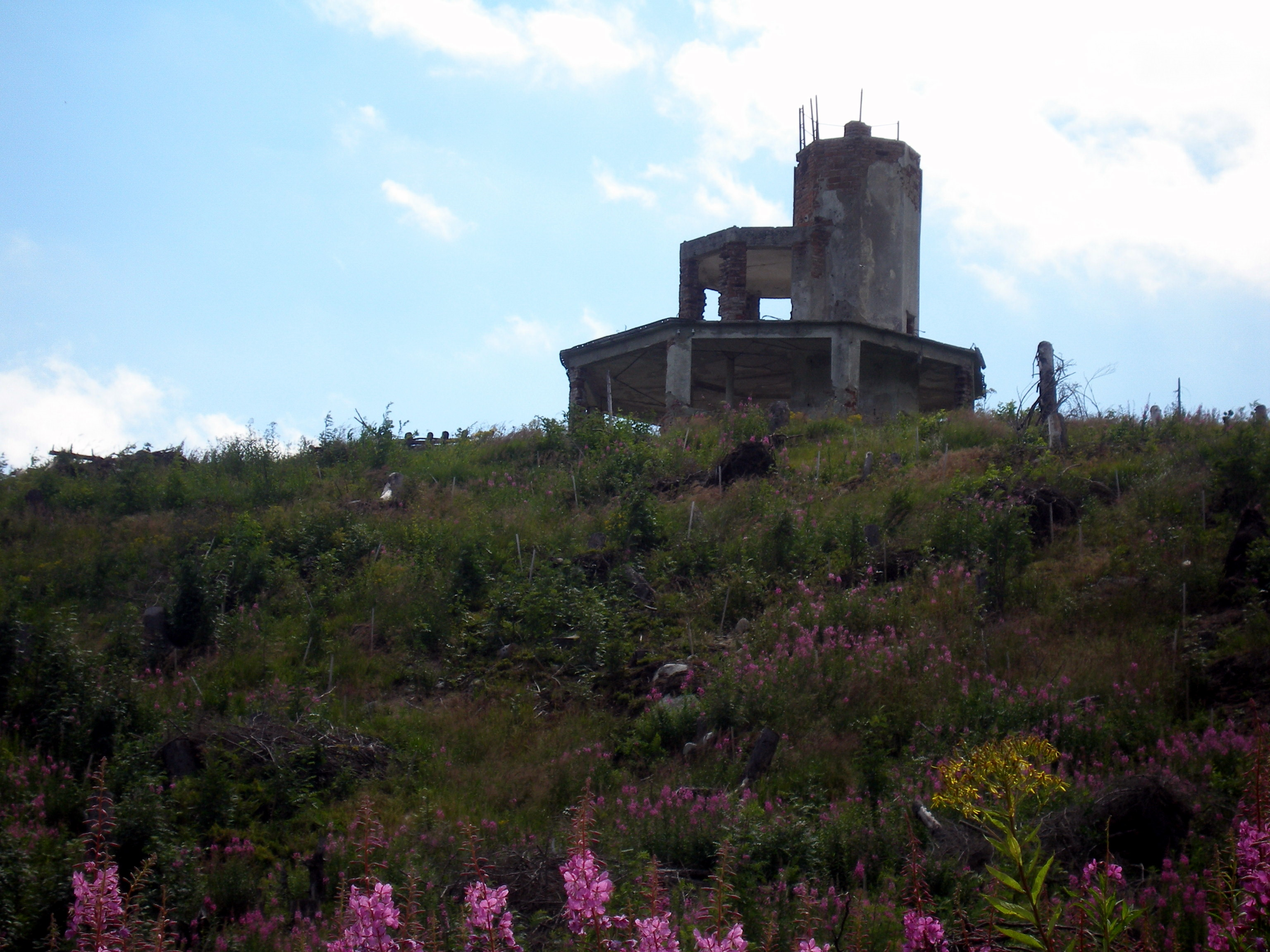 Rozhľadňa Monte Mory, JZ od železničnej stanice, na kopci. Doba vzniku 1930. Prevládajúci sloh moderné hnutie. Štrbské Pleso, obec Štrba. Okres Poprad.